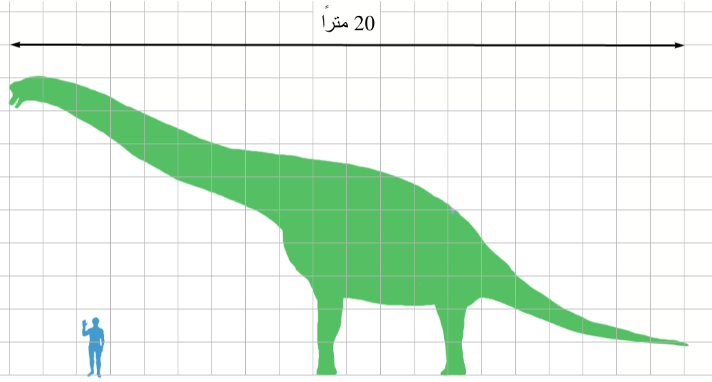 رسمٌ يُظهر مقارنة بين حجم الديناصور الزرافي العملاق جيرافاتايتن والإنسان. كل مربّع يُمصّل مترًا مُربعًا.